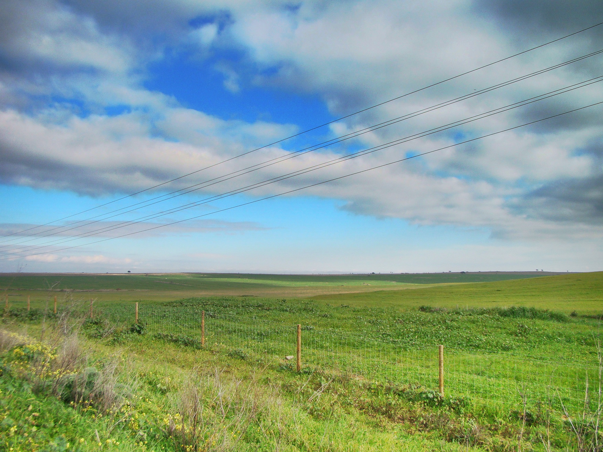 Campo verde no Alentejo